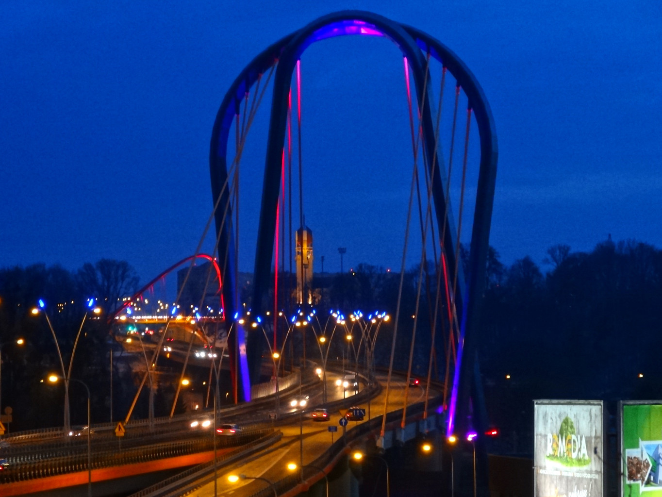 Trasa Uniwersytecka w Bydgoszczy - widok od południa